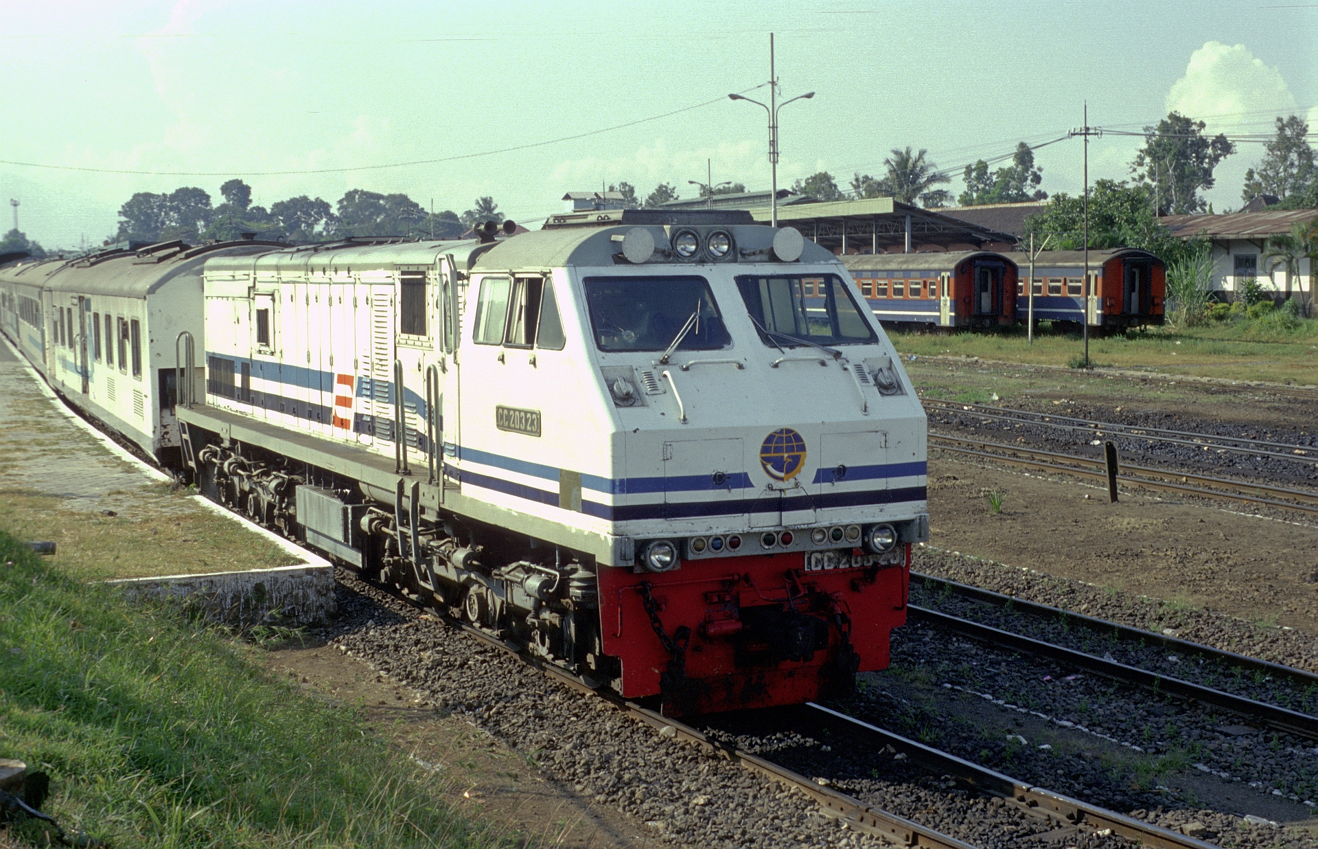 PTKACC203 (203 023 A)